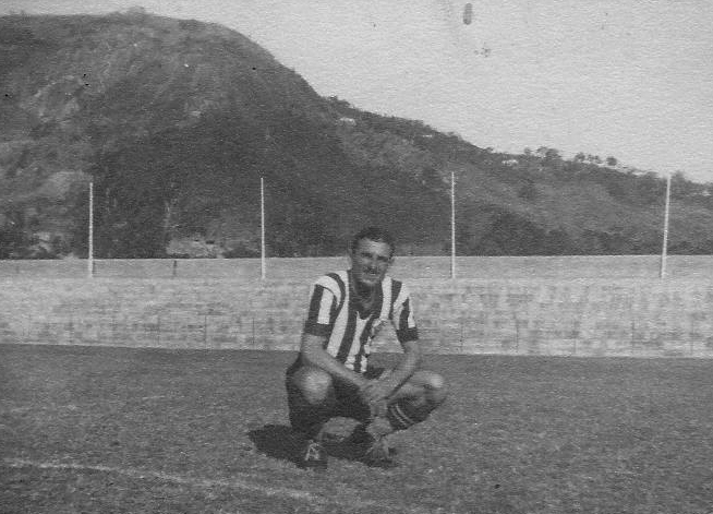 Português do Brasil: Paschoal em General Severiano